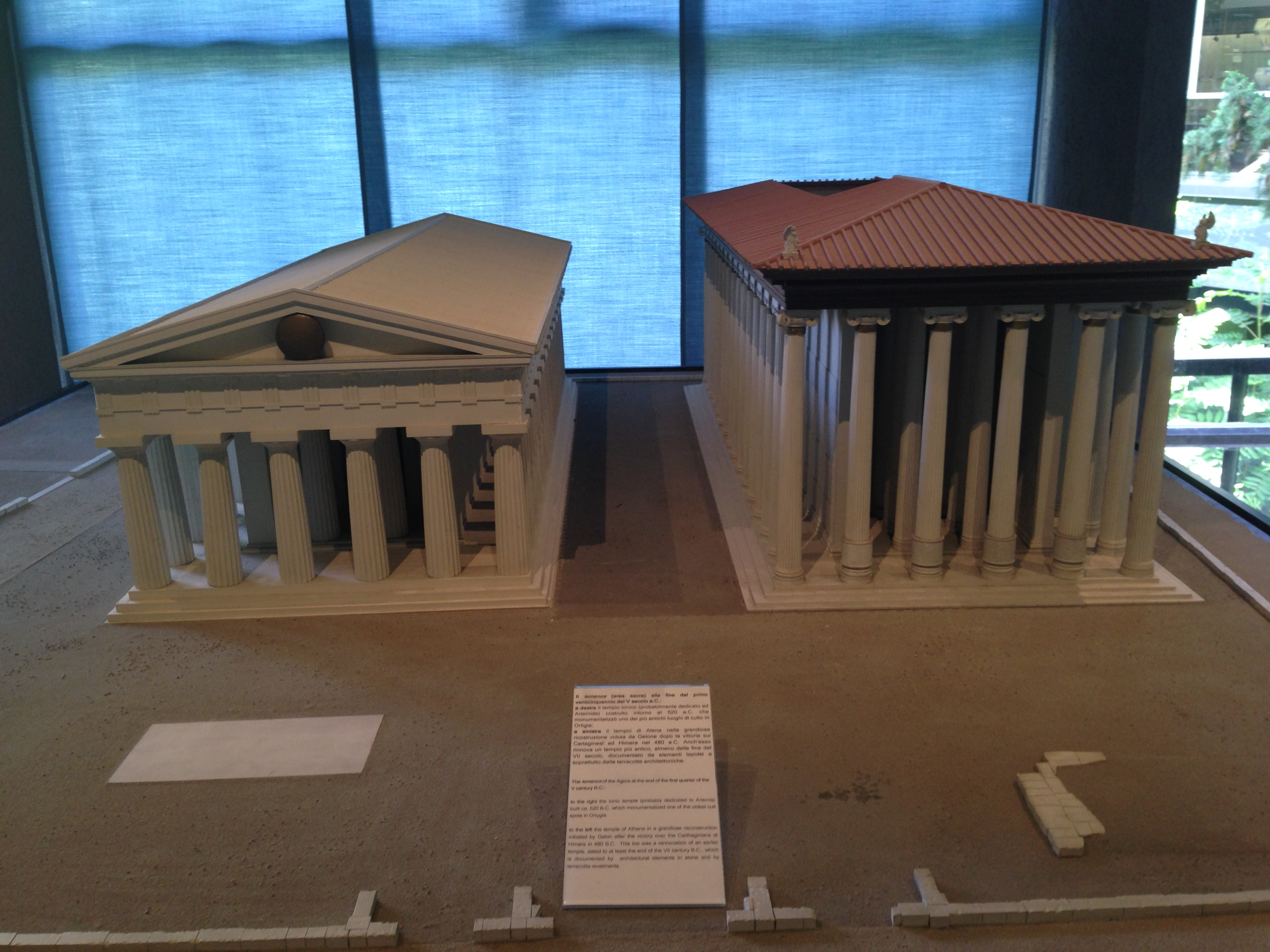 ricostruzione templi Ortigia